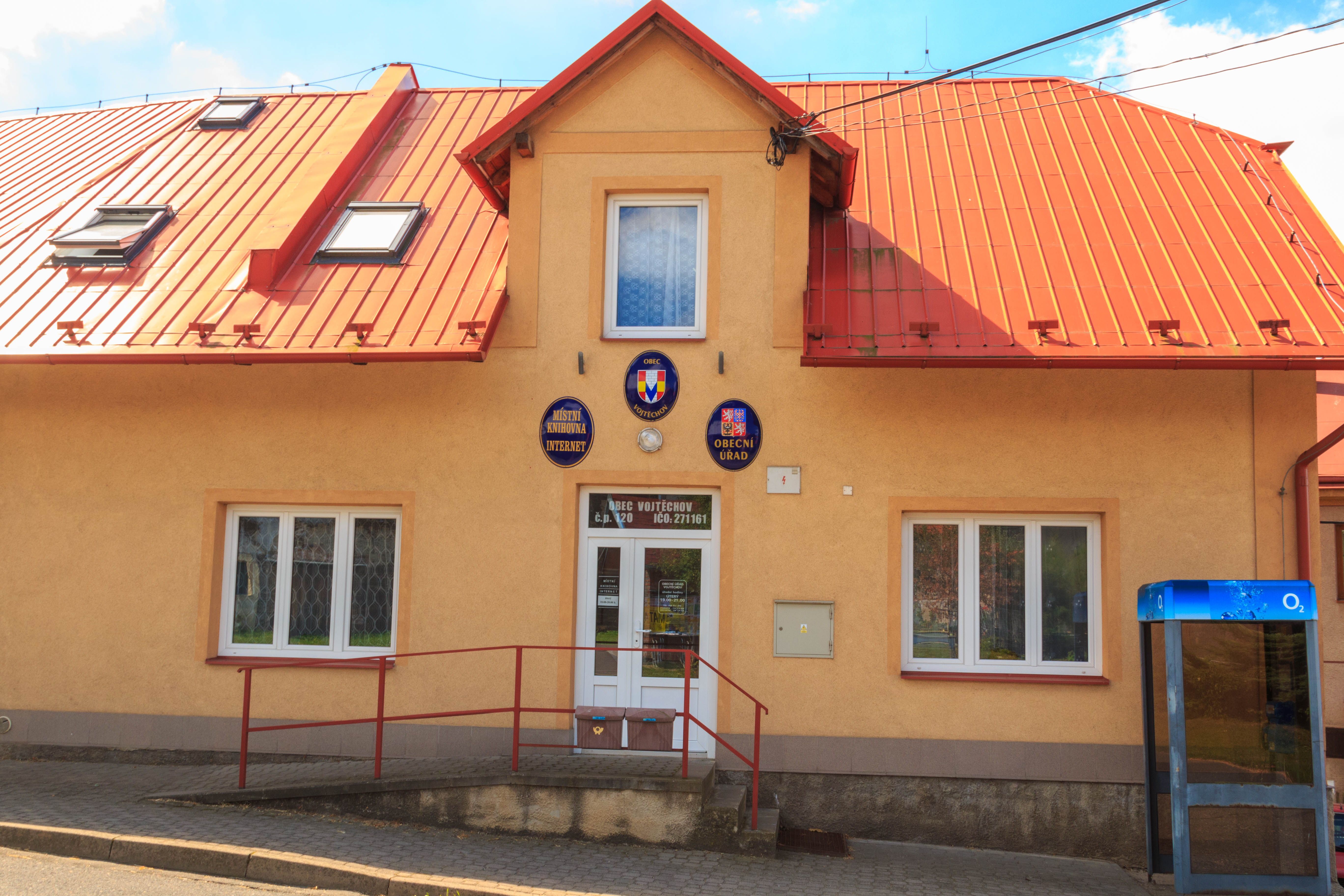 Vojtěchov - obecní úřad